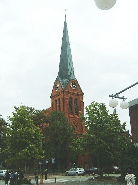 Sankt Franziskuskirche in Schwarzenbek in Schleswig Holstein